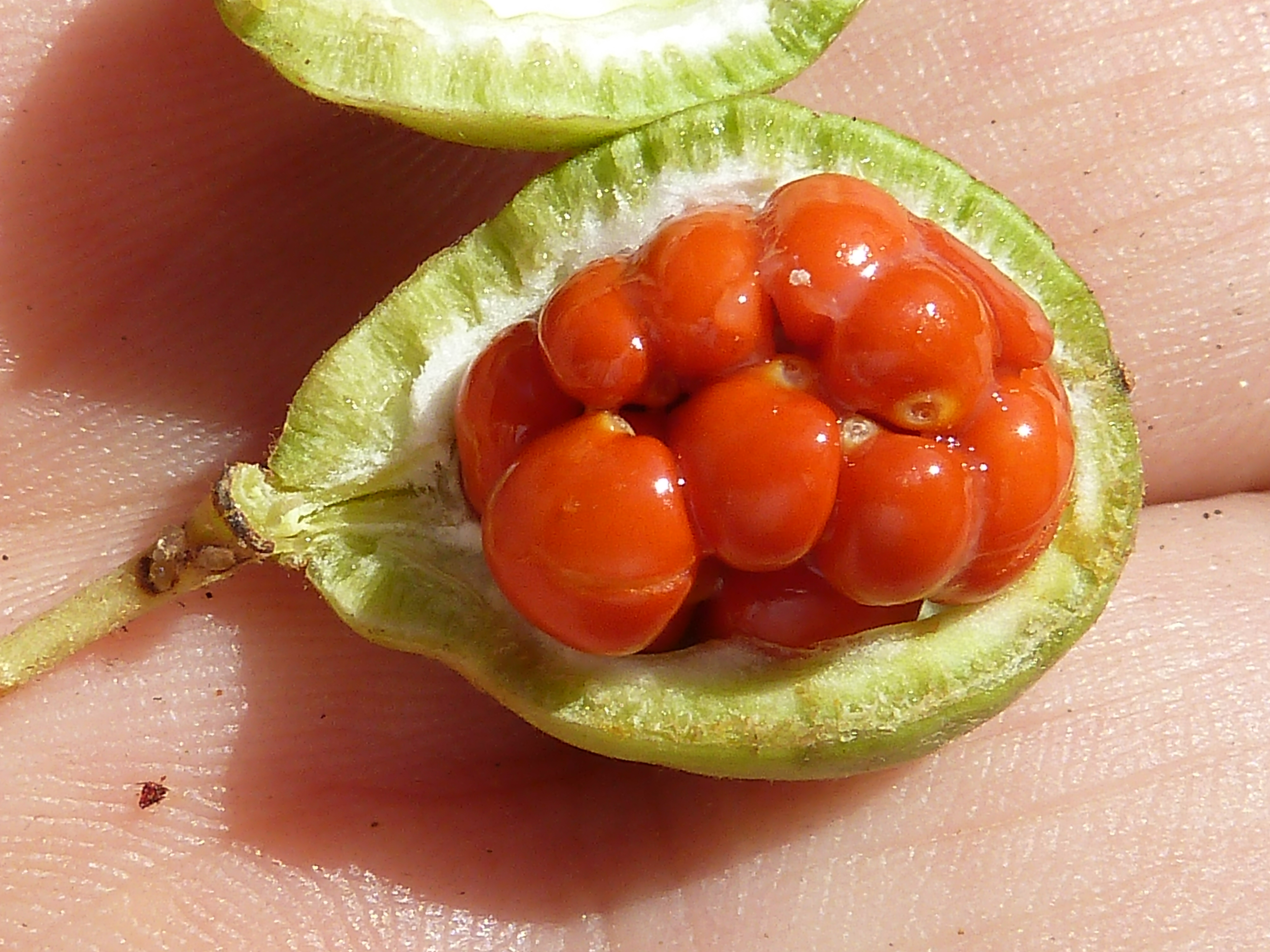 Pittosporum tobira (Azahar de la China, Azarero): fruto abierto, con sus simientes pegajosas - Parque de la Huerta, Albatera (Provincia de Alicante, España).